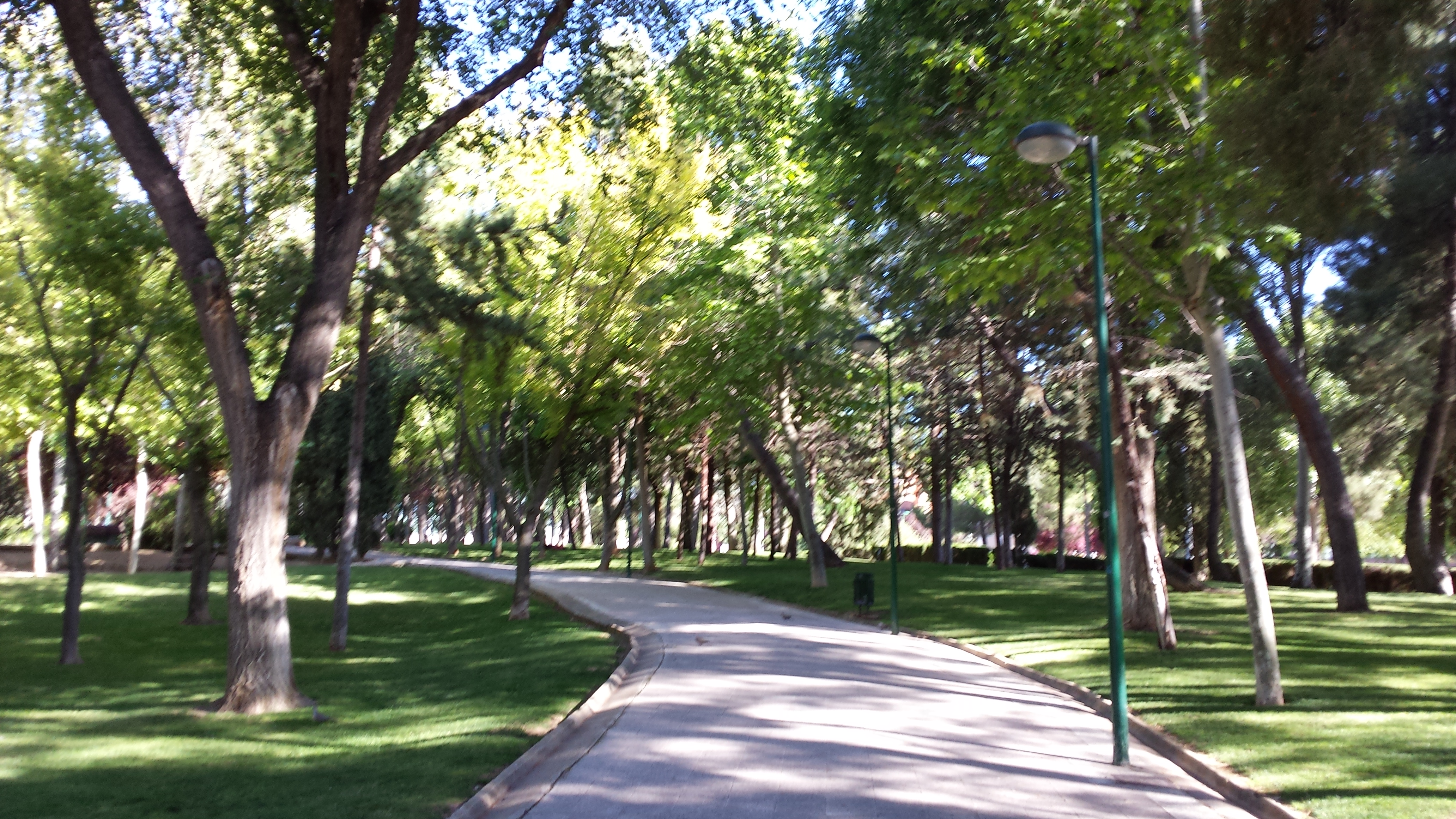 Parque Polígono San Antón. Albacete